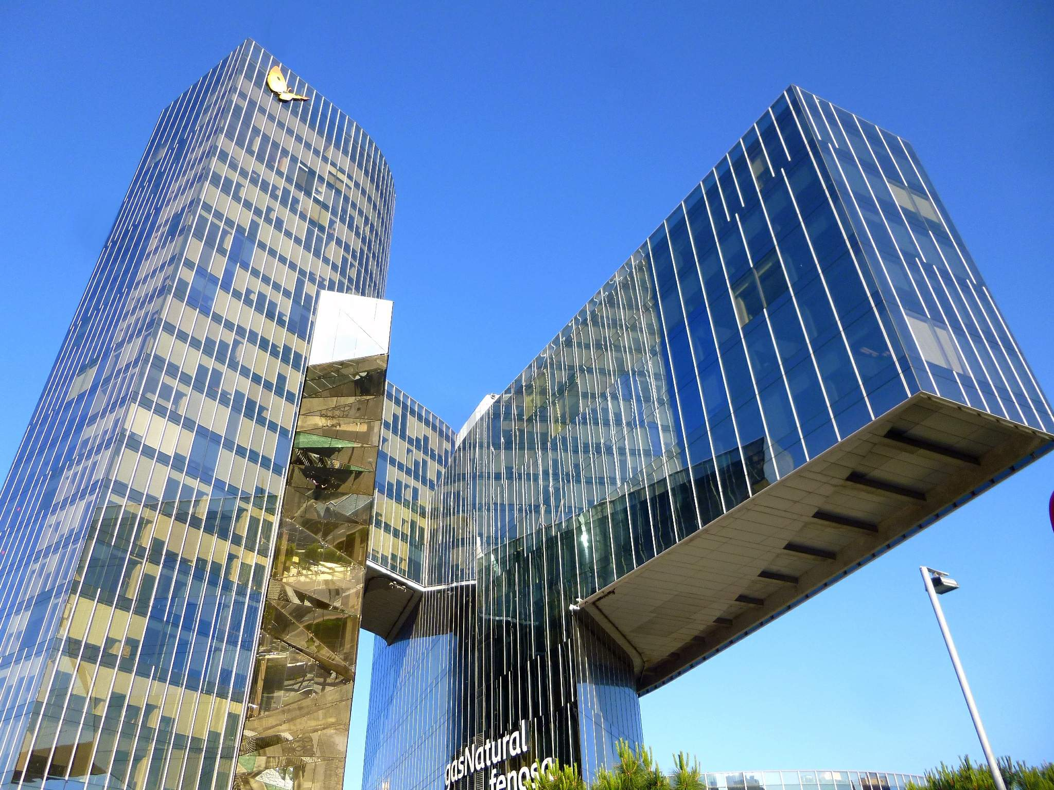 Barcelona - Edifici Gas Natural (Torre Mare Nostrum)